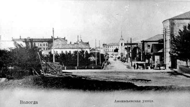 Афанасьевская улица в Вологде